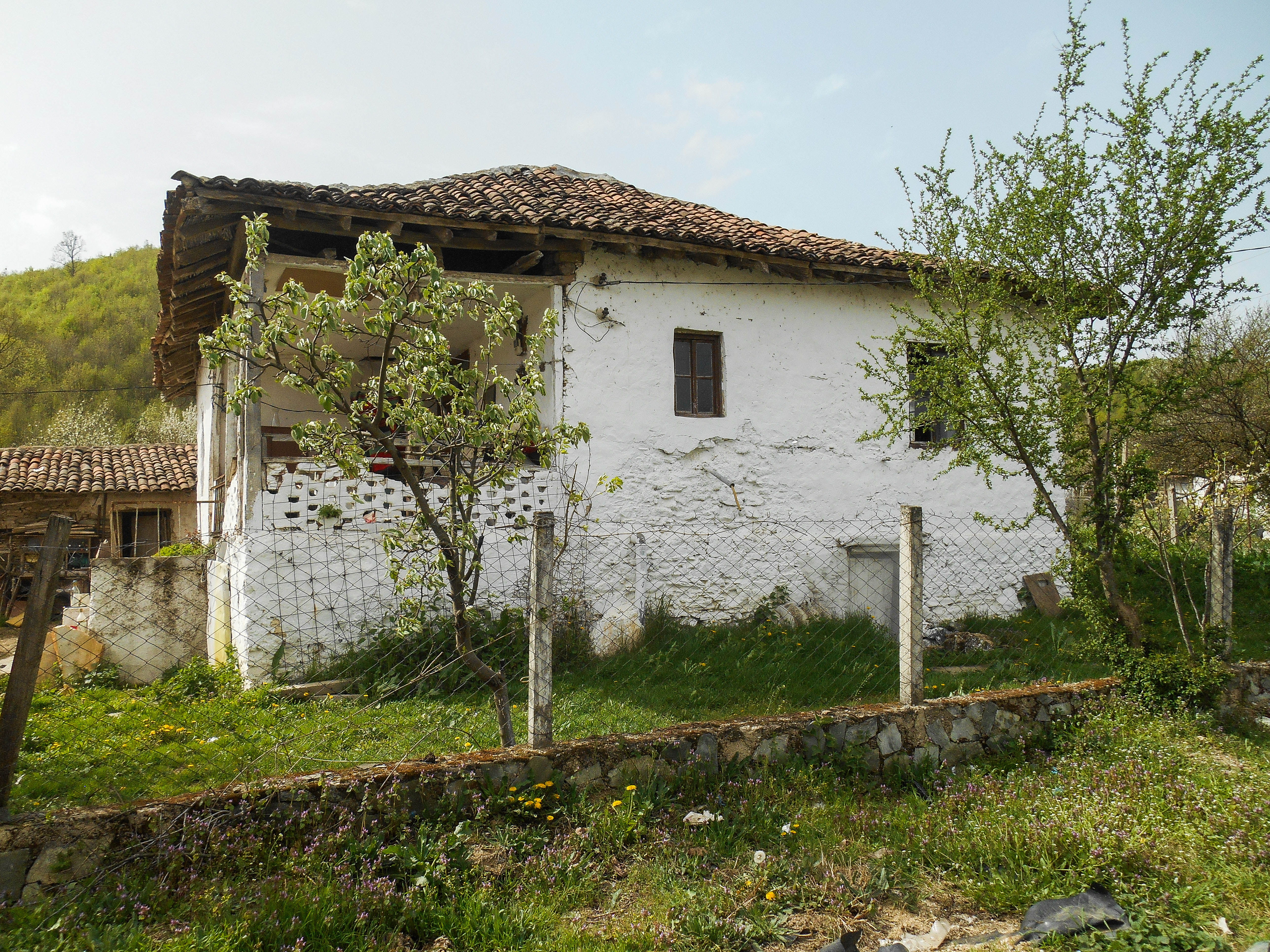 Куќа во Раборци